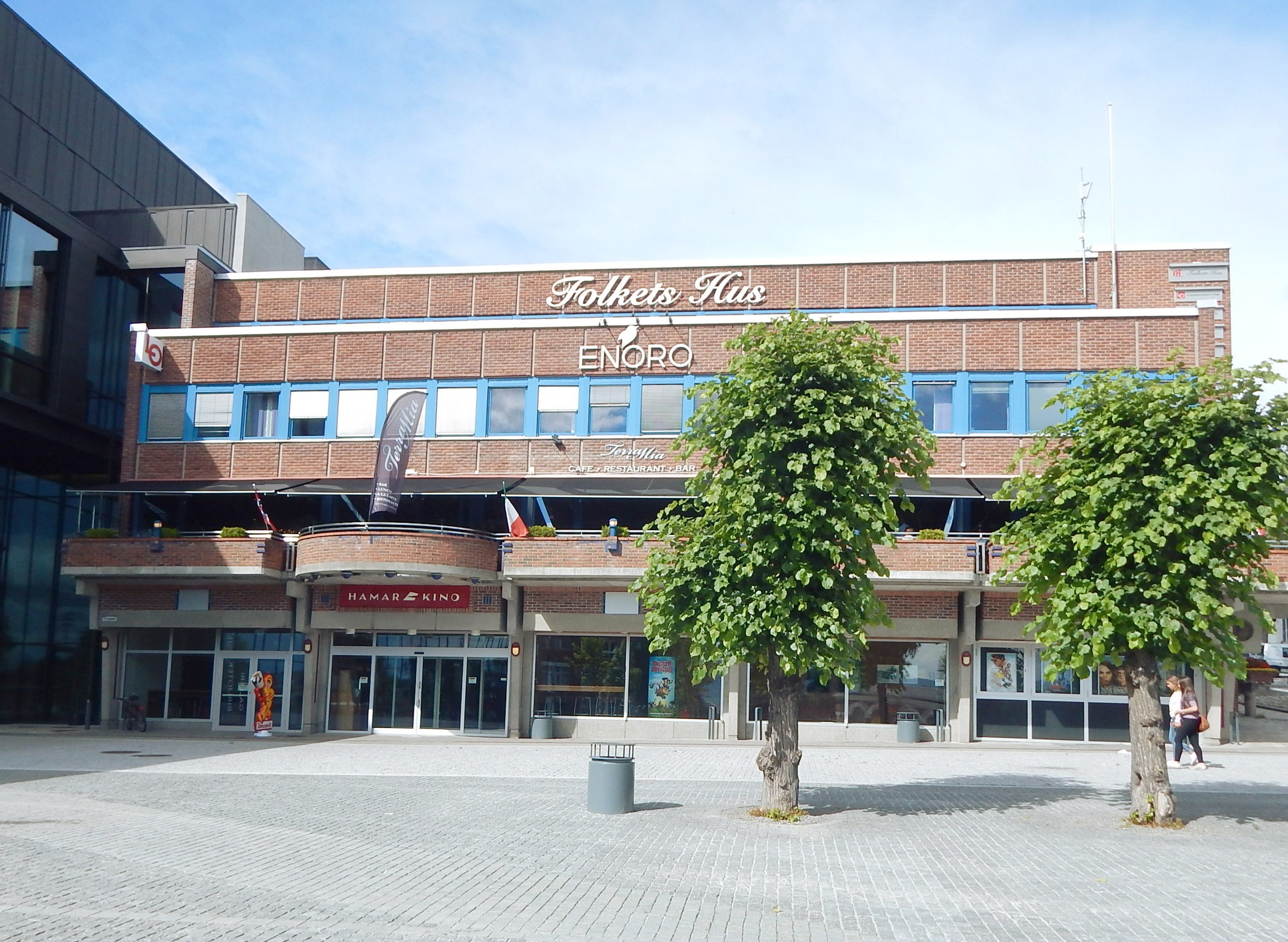 Folkets hus Hamar